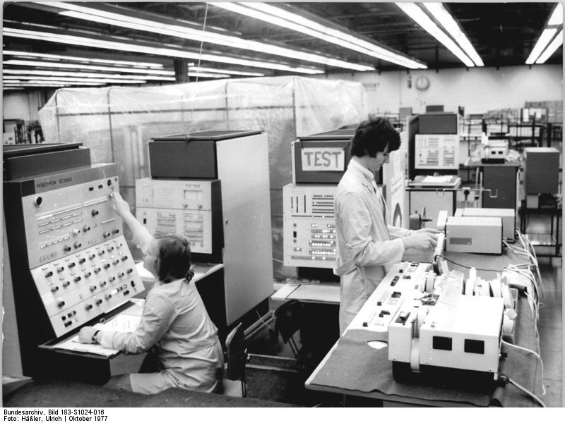 VEB Robotron Elektronik Dresden, Computer EC 1040 ADN-ZB Häßler 24.10.77 Dresden: 60. Jahrestag-Rechner der 3. Generation mit einer Geschwindigkeit vom 380.000 (380 000) Operationen pro Sekunde werden von den Werktätigen des Kombinats Robotron Dresden hergestellt. Hier testen die Prüffeldingenieure Helmfried Hausmann (l) und Gerhard Sebald die Zentraleinheit für einen Rechner vom Typ EC 1040. die 60. EDV-Anlage dieses Typs wurde kürzlich drei Wochen vorfristig an die sowjetischen Abnehmer übergeben. Seit Jahren bewähren sich diese Rechner u.a. im Vereinigten Kernforschungsinstitut in Dubna, im Automobilwerk an der Kama und in vielen anderen Betrieben.